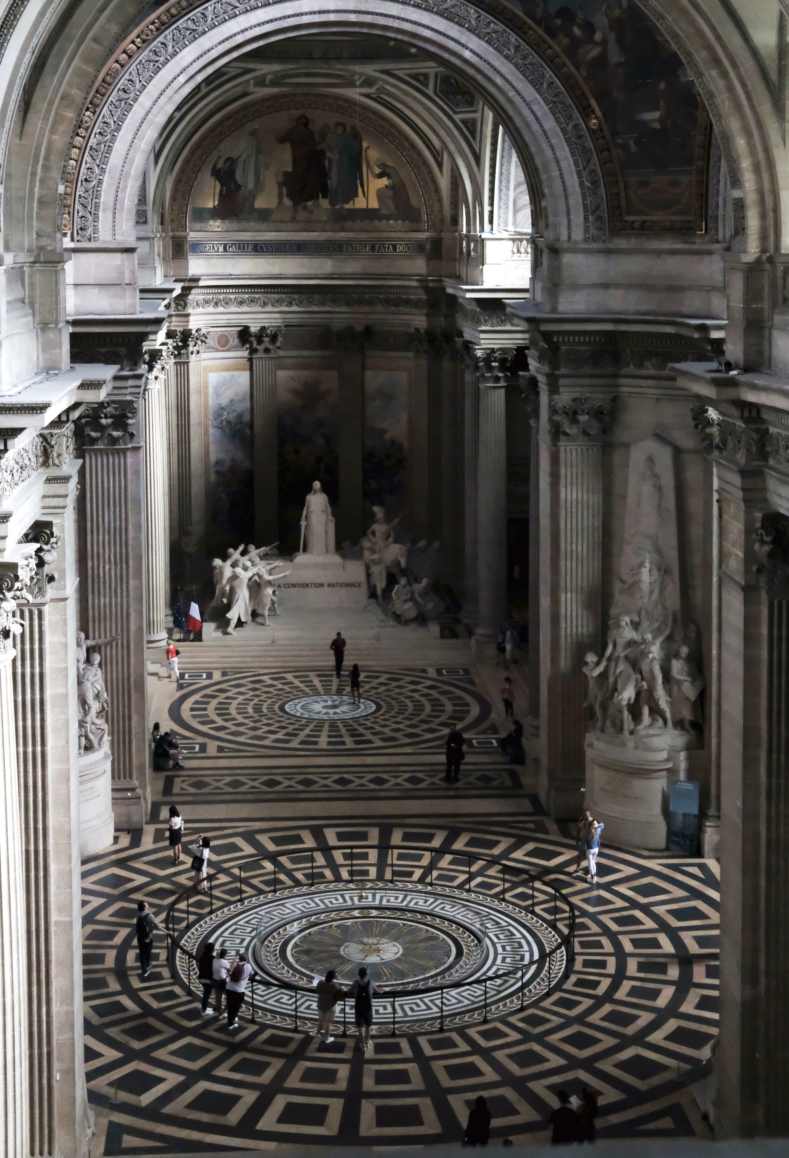 Paris V - Panthéon, nef avec le pendule de Foucault.